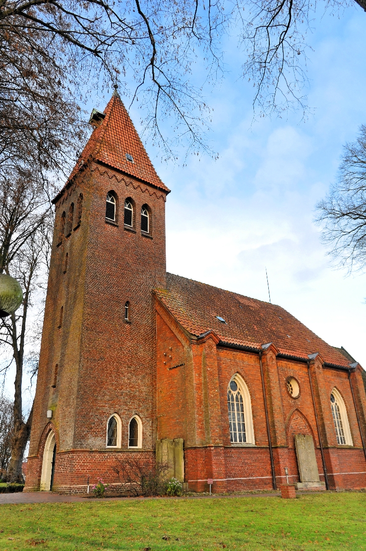 Flögeln 2012